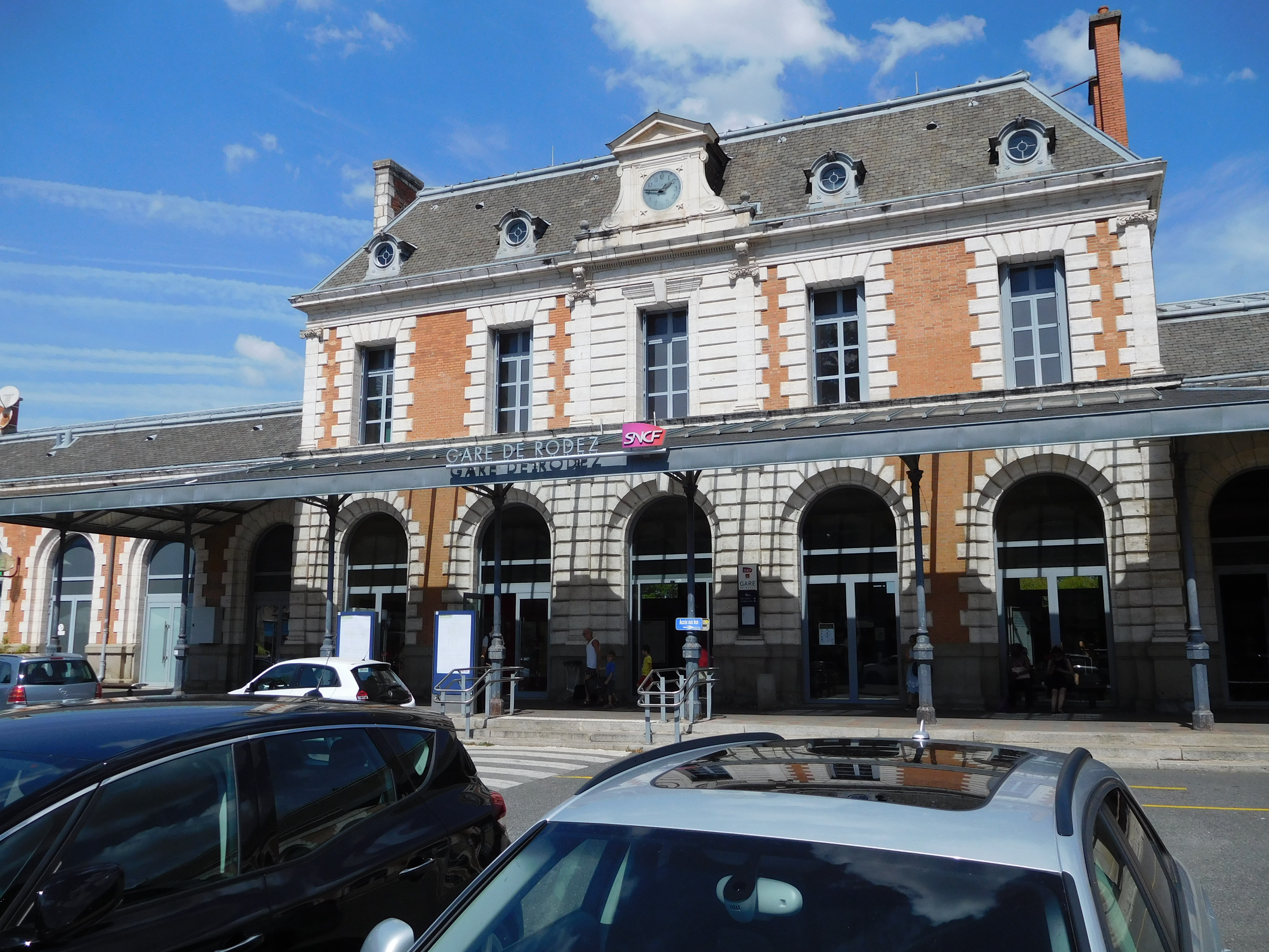 Façade de la gare de Rodez (département de l'Aveyron, France) en 2017.